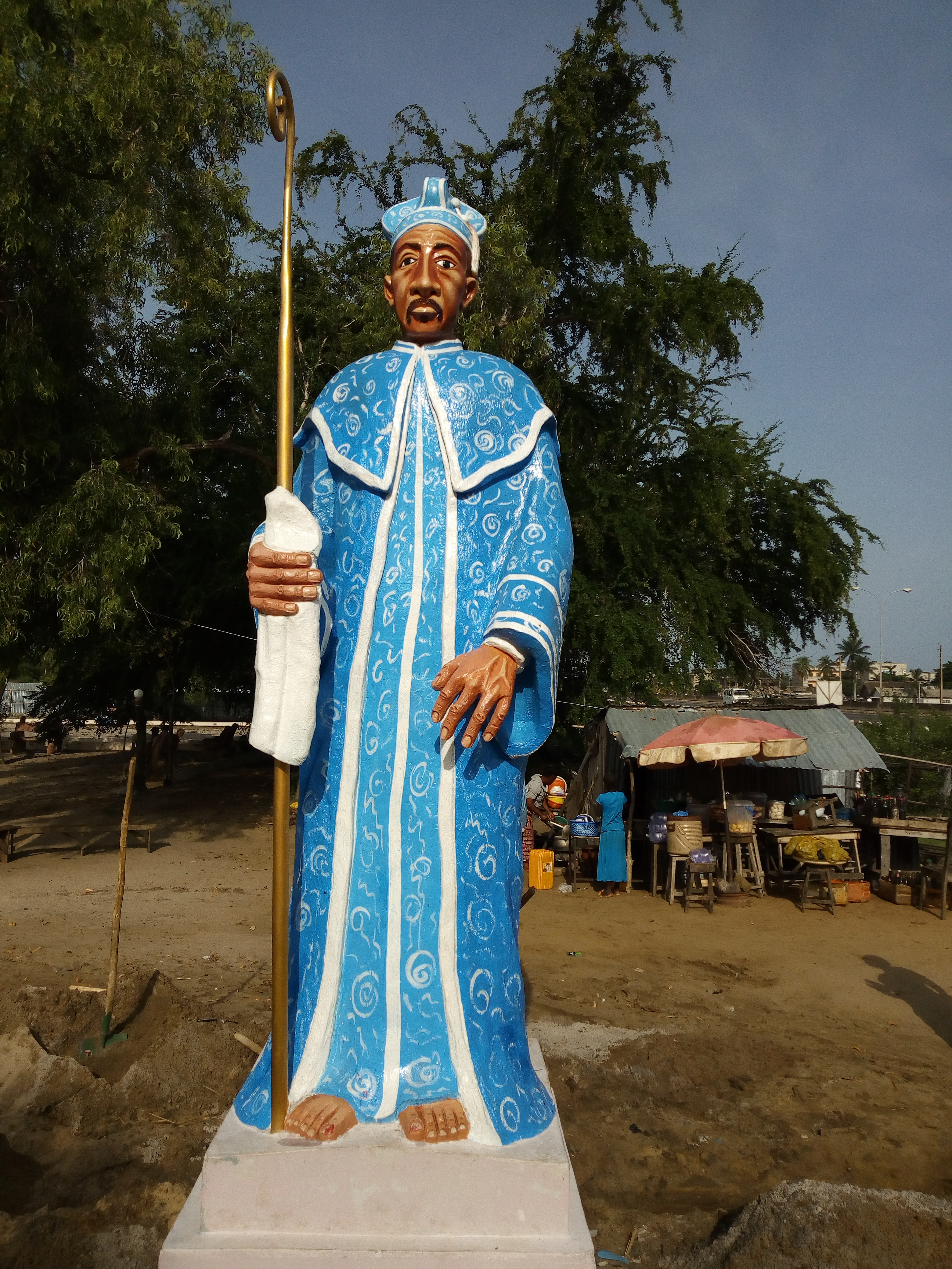 Statue du prophète OSHOFFA érigé dans la commune de Sème Kpodji au Bénin à l'entré du lieu de Pèlerinage des Christianistes célestes au Bénin